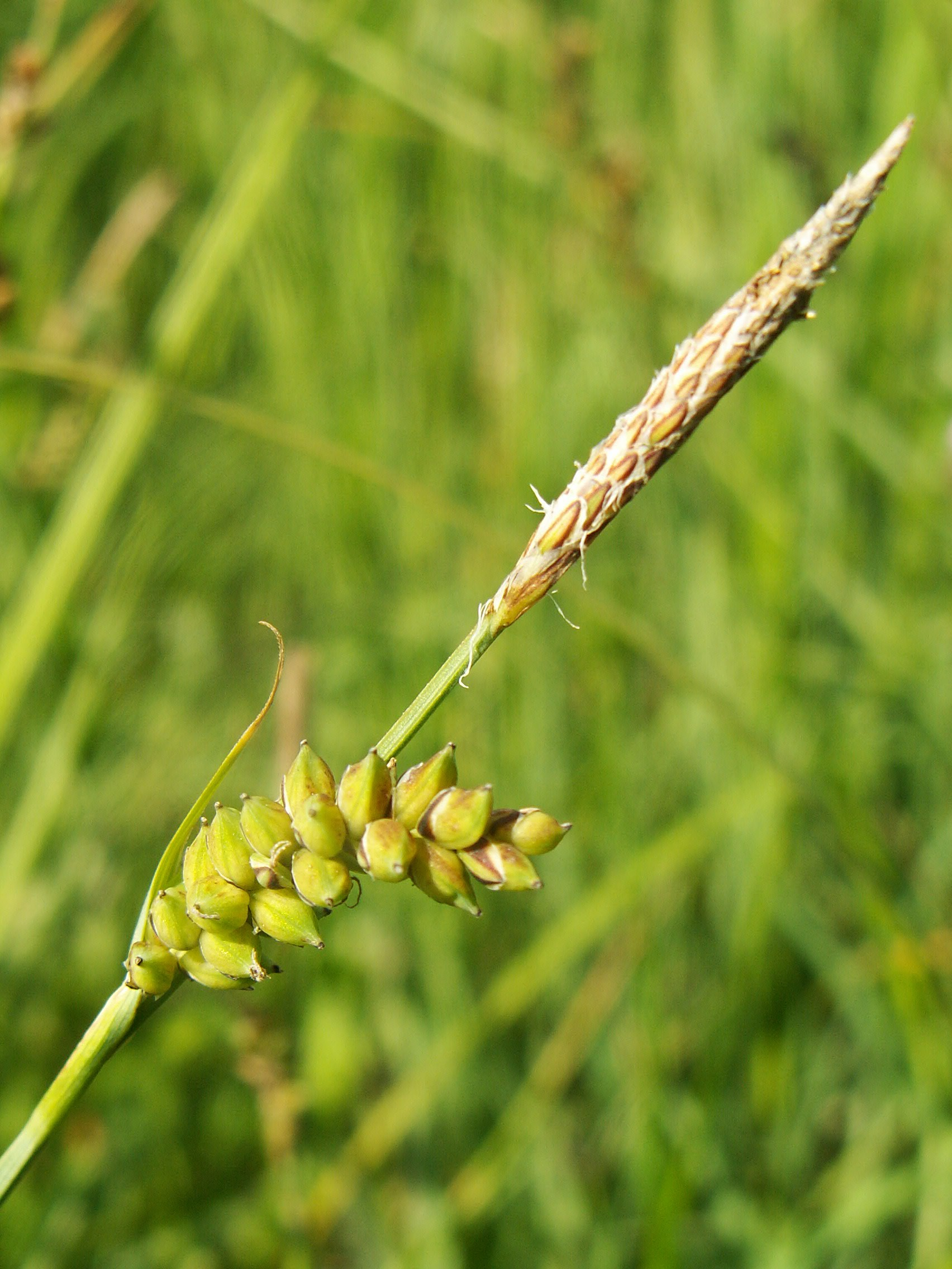 Carex panicea, Krajnik NW Poland